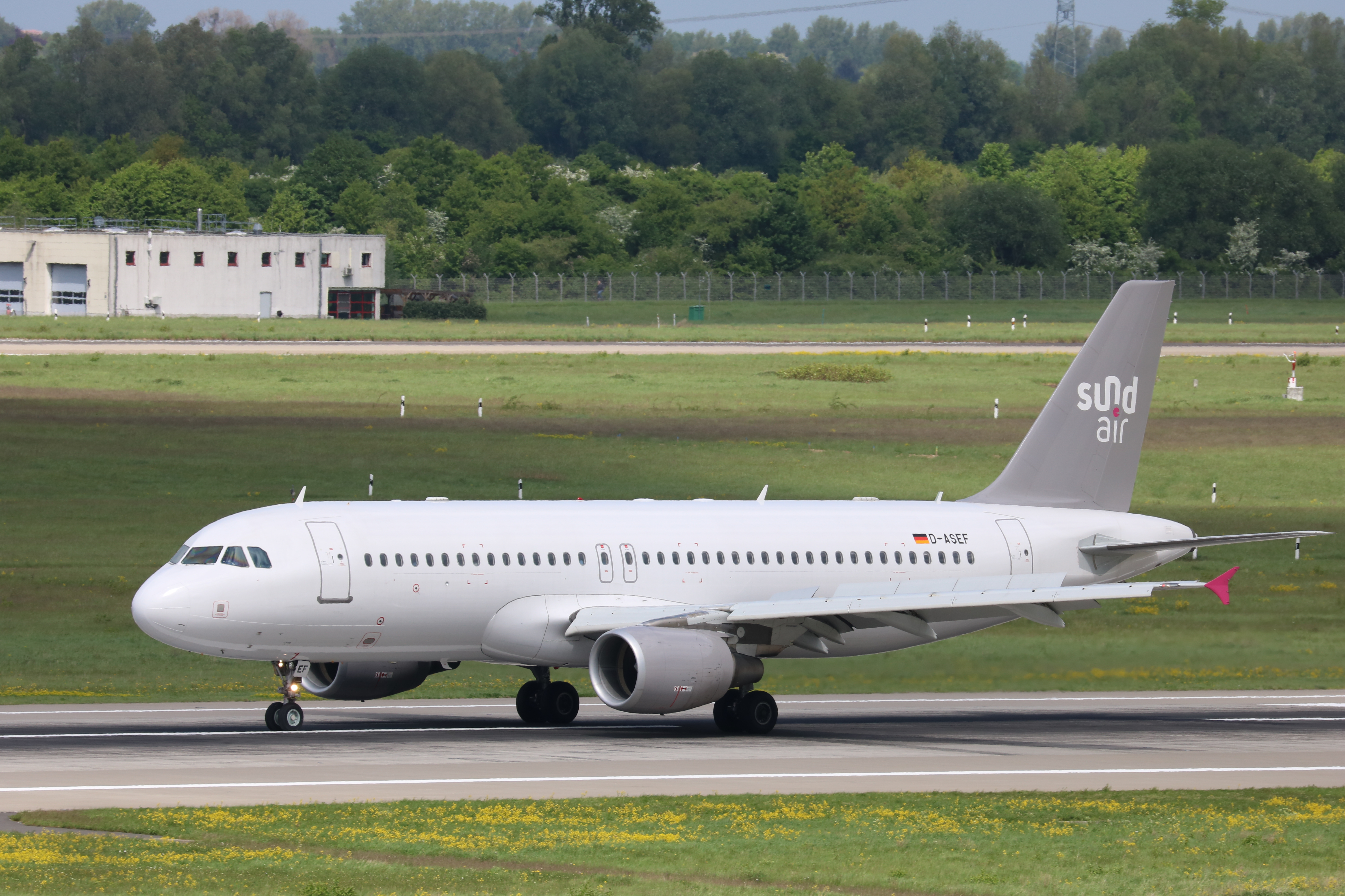 Flughafen Düsseldorf, Airbus A320-200 (D-ASEF) der Sundair